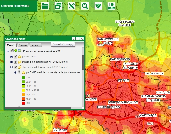 Mapa pochodząca z Programu ochrony powietrza województwa śląskiego z roku 2014